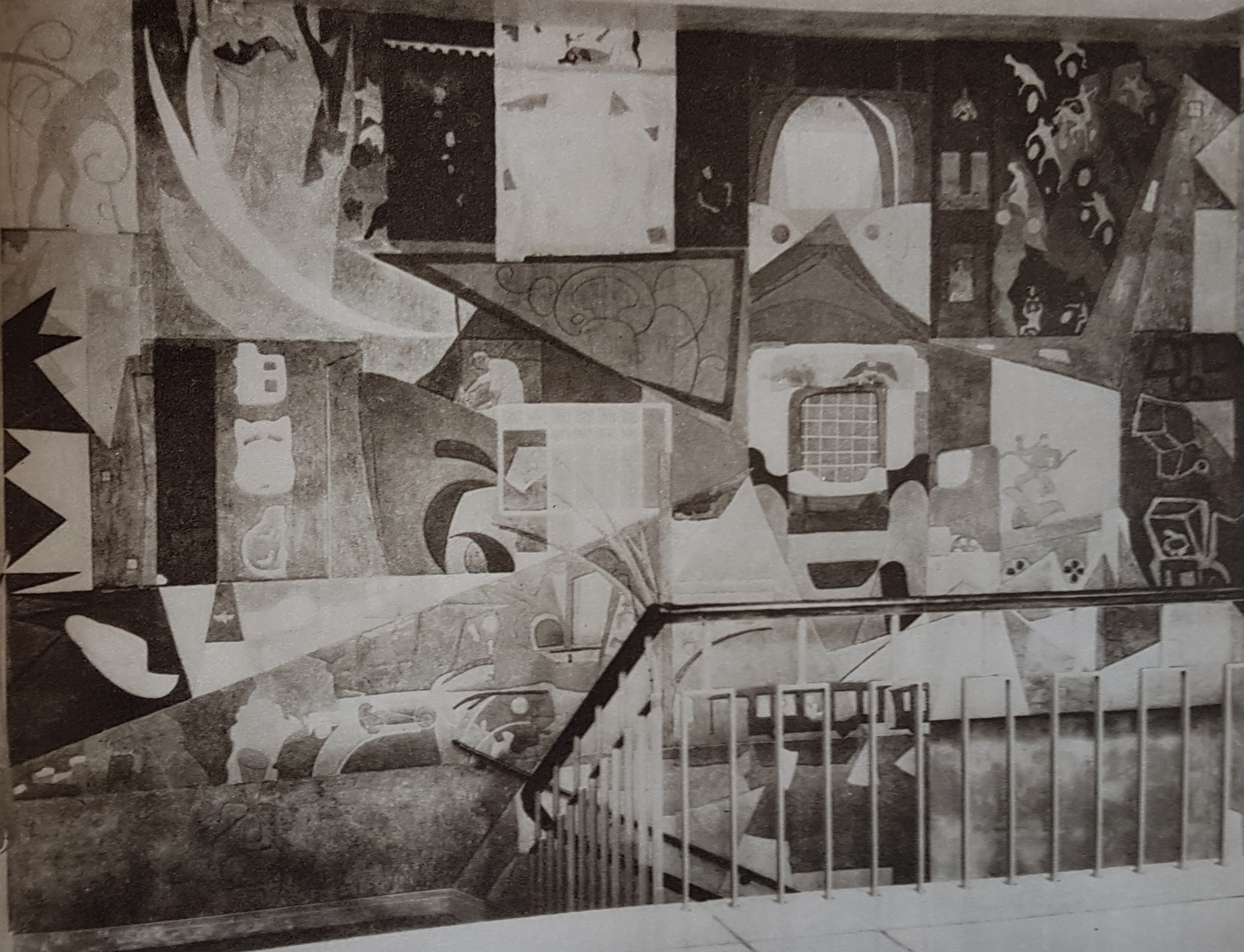 Väggmålning i Bergaskolan Uppsala utförd av Nils Gehlin, avfotograferad bild från Allhems Svenskt konstnärslexikon.